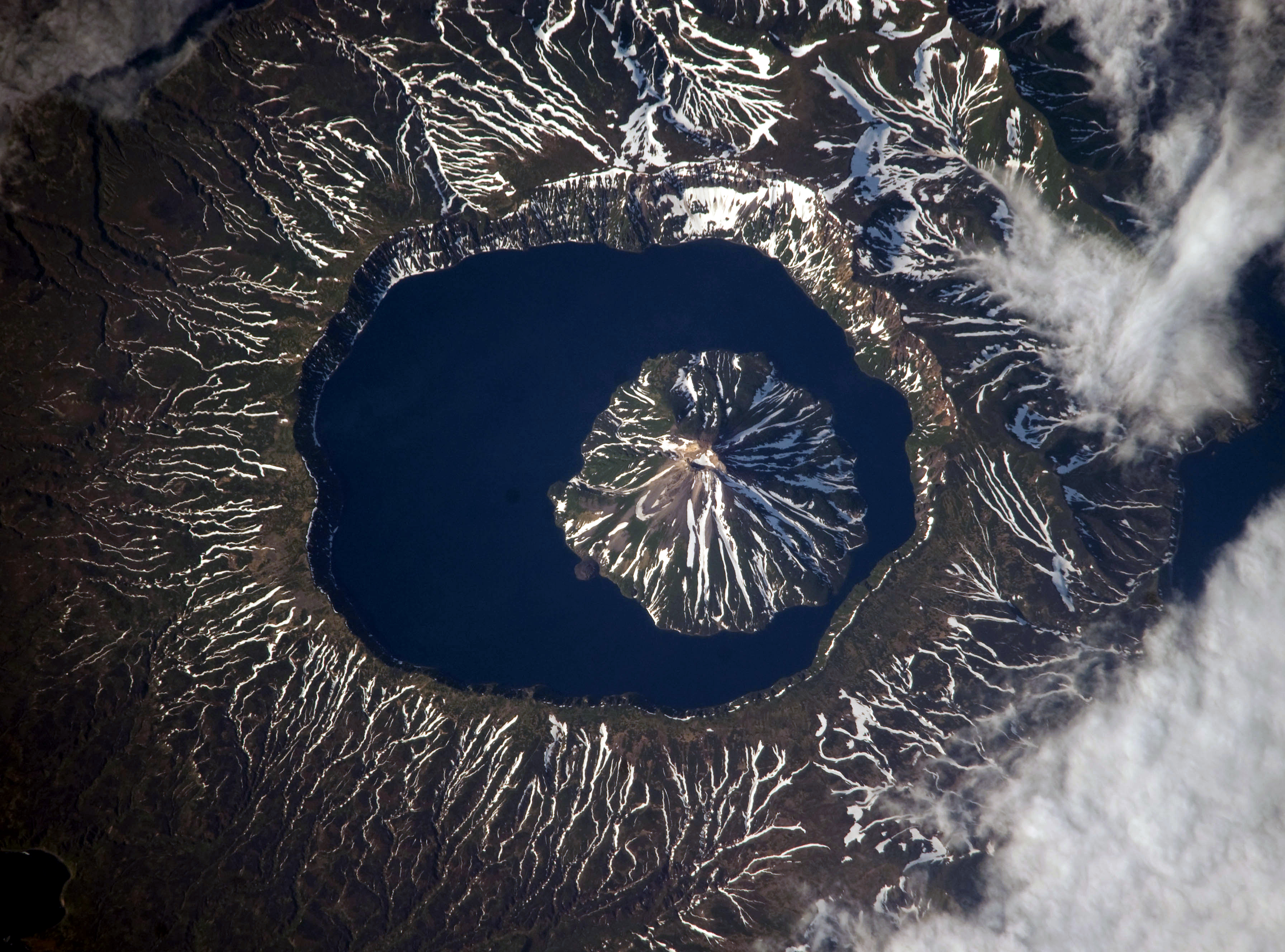 Вулкан Креницына. Снимок с МКС. Фрагмент